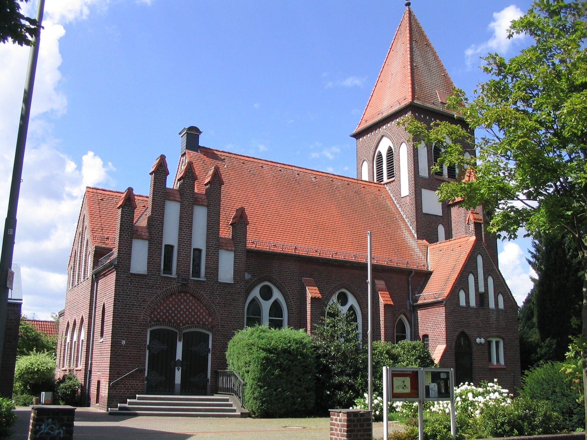 Das Bild zeigt die evangelische Kirche in Willich-Anrath, Deutschland. This image shows a heritage building in Germany, located in the North Rhine-Westphalian city Willich (no. 17).